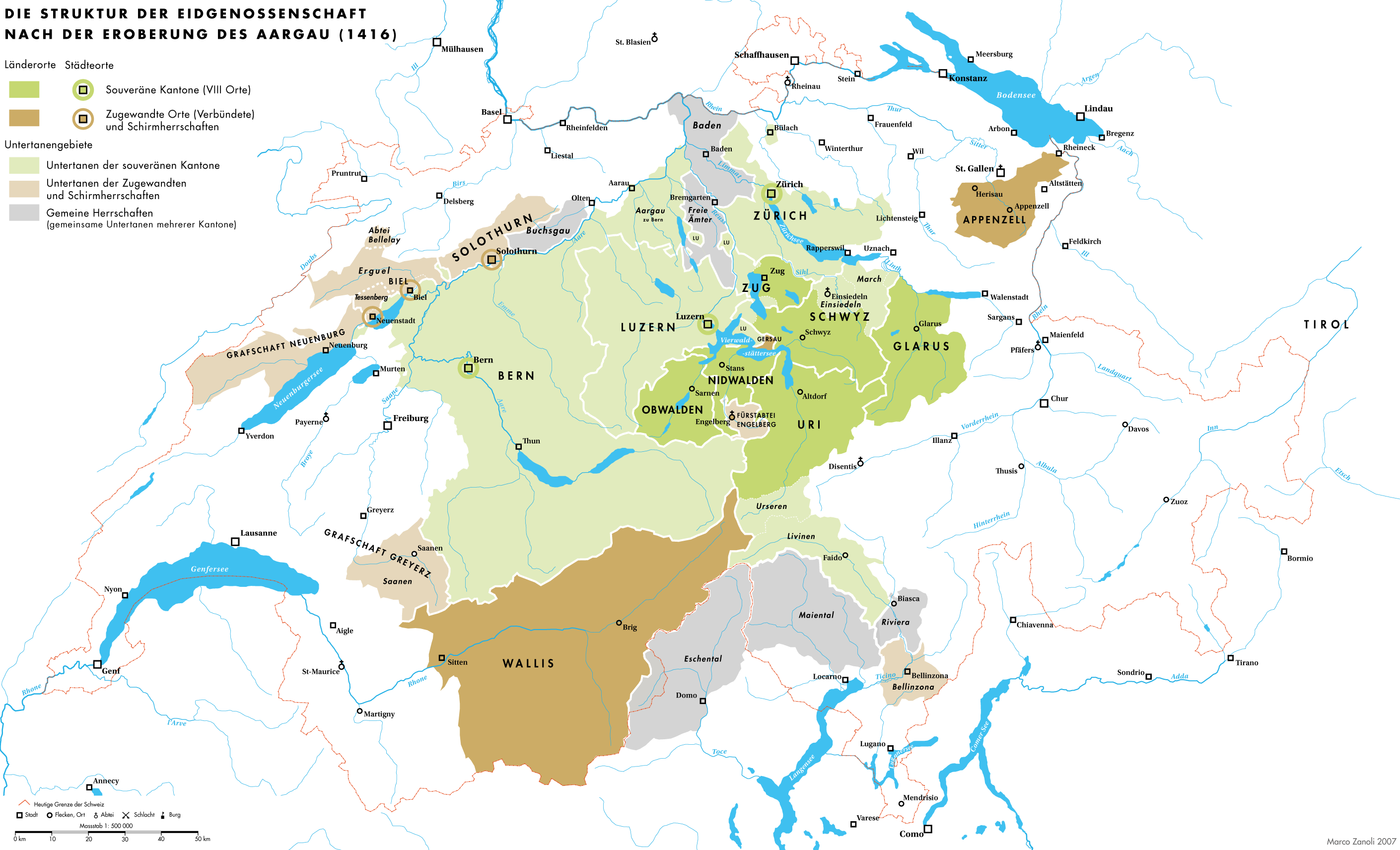 Die Struktur der Eidgenossenschaft der Acht Orte nach der Eroberung des Aargau 1416